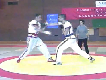 Tecnica di pugno durante un combattimento sportivo di Shou Bo